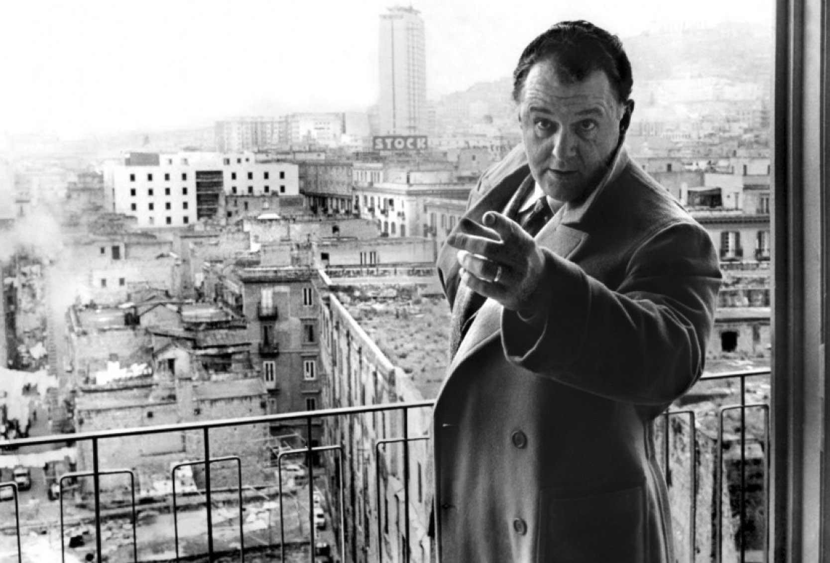 Rod Steiger in Le mani sulla città. Alle spalle, l'hotel Jolly.